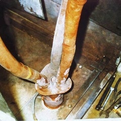 Следы воздействий частичных разрядов в изоляции